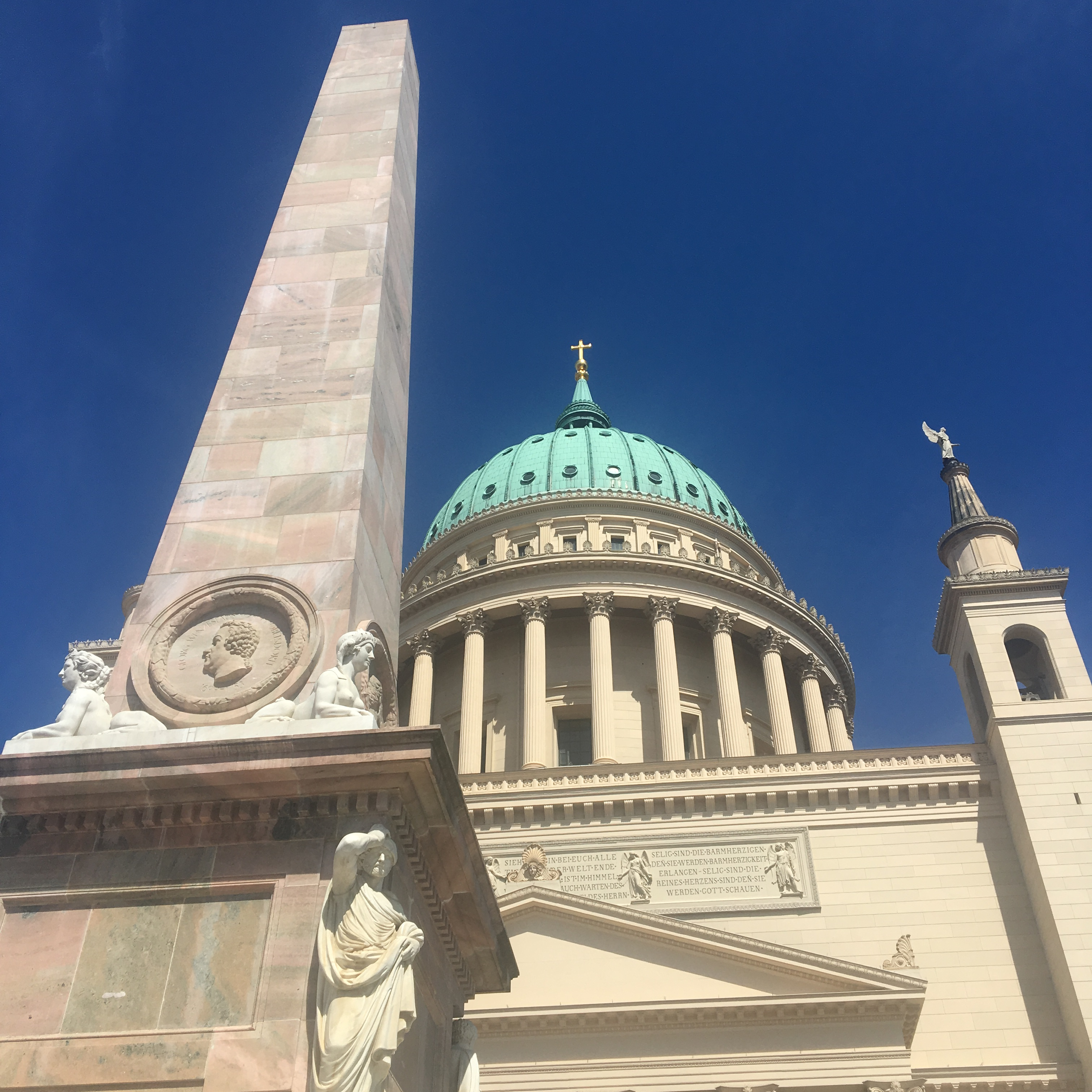 Detailansicht des Marmorobelisken vor der St. Nikolaikirche am Alten Markt in Potsdam. Zu sehen ist das Bildnismedaillon für Georg Wenzeslaus von Knobelsdorff.